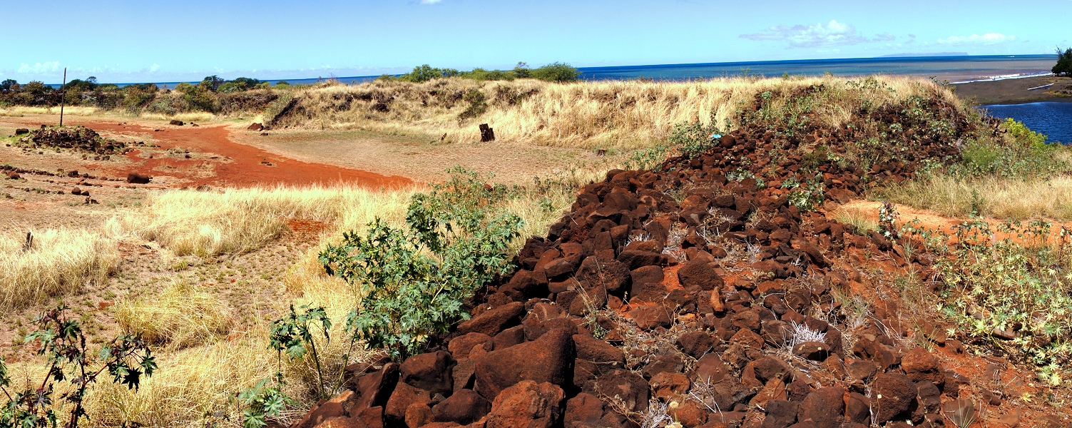 Иллюстрация для викиучебника Гавайеведение